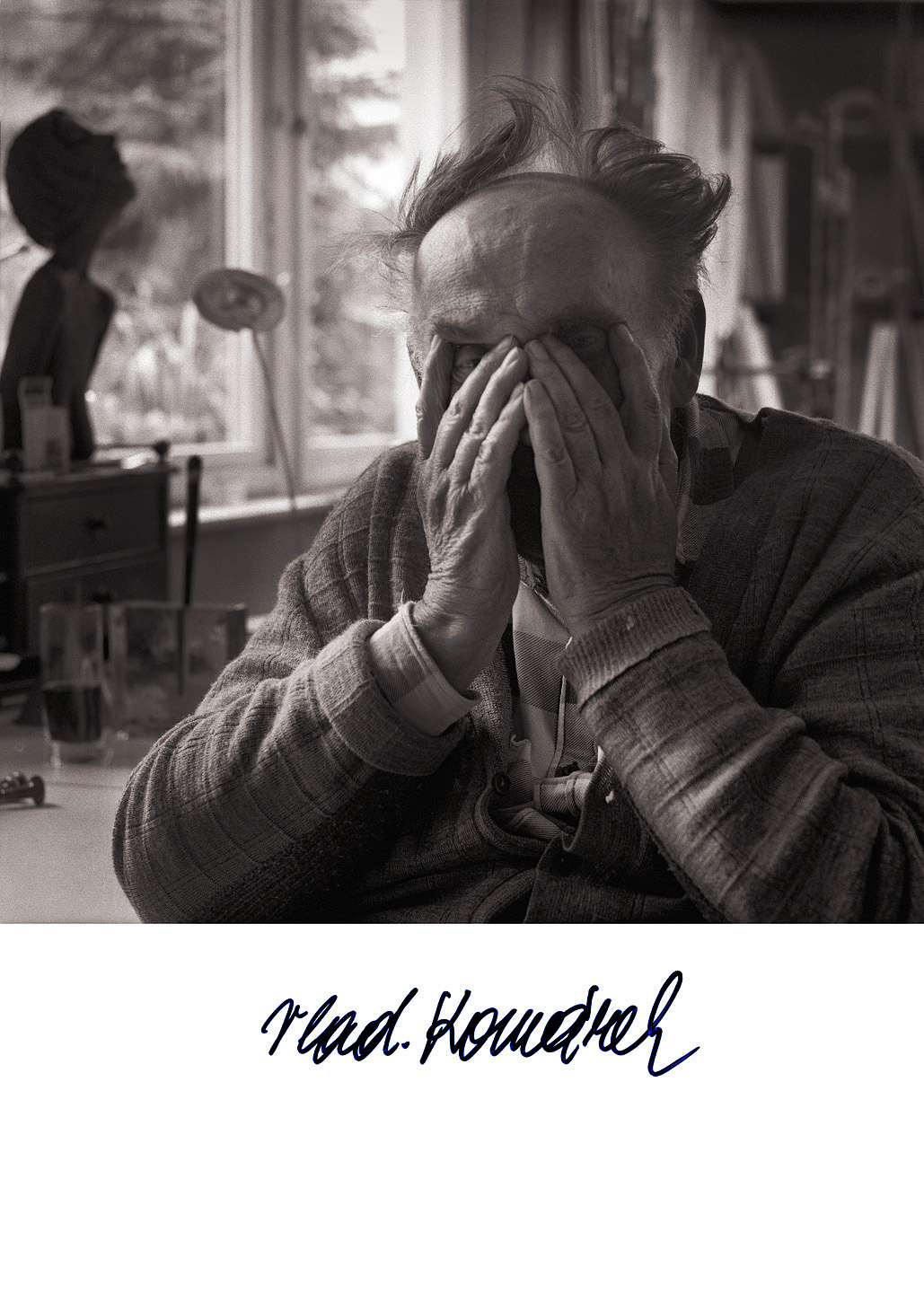 Jiří Jiroutek´s picture Cyklus: Osobnosti